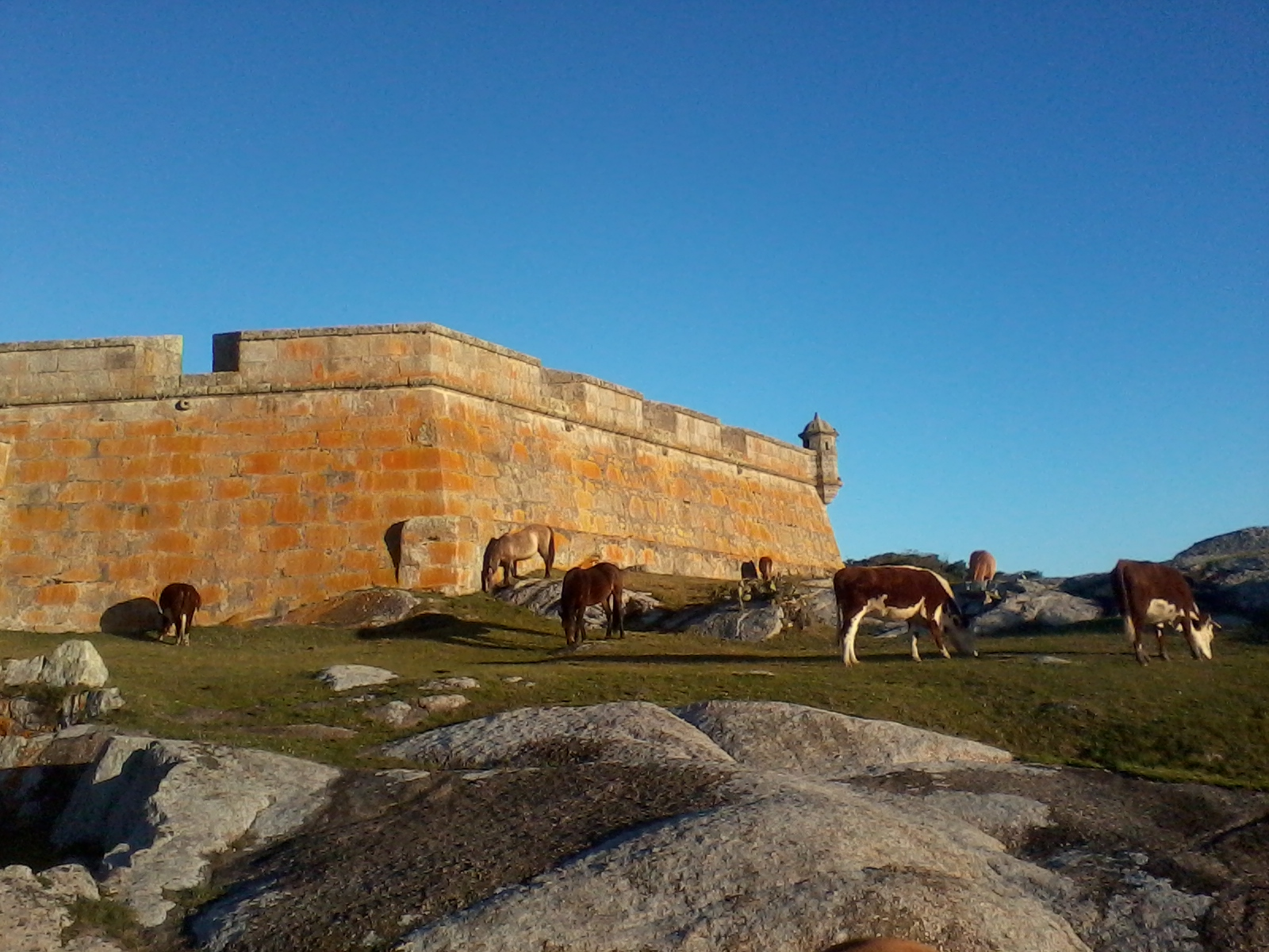 Fortaleza de Santa Teresa. Ubicada en el departamento de Rocha